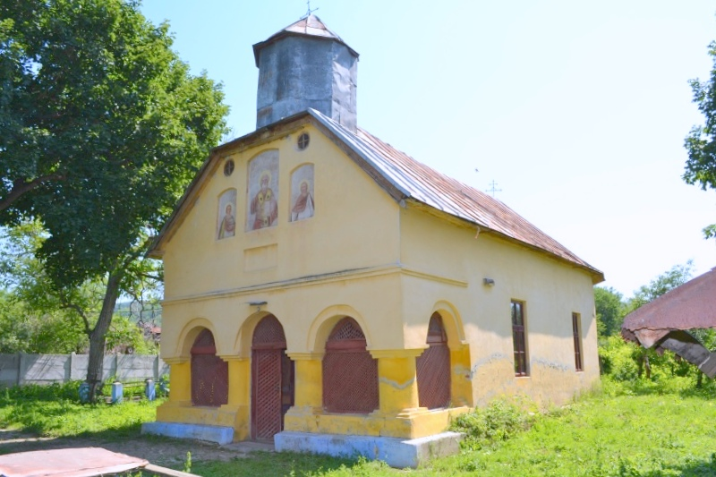 Biserica „Sf. Nicolae”, sat Țânțaru; comuna Butoiești În centrul satului 1784, refăcută în 1846